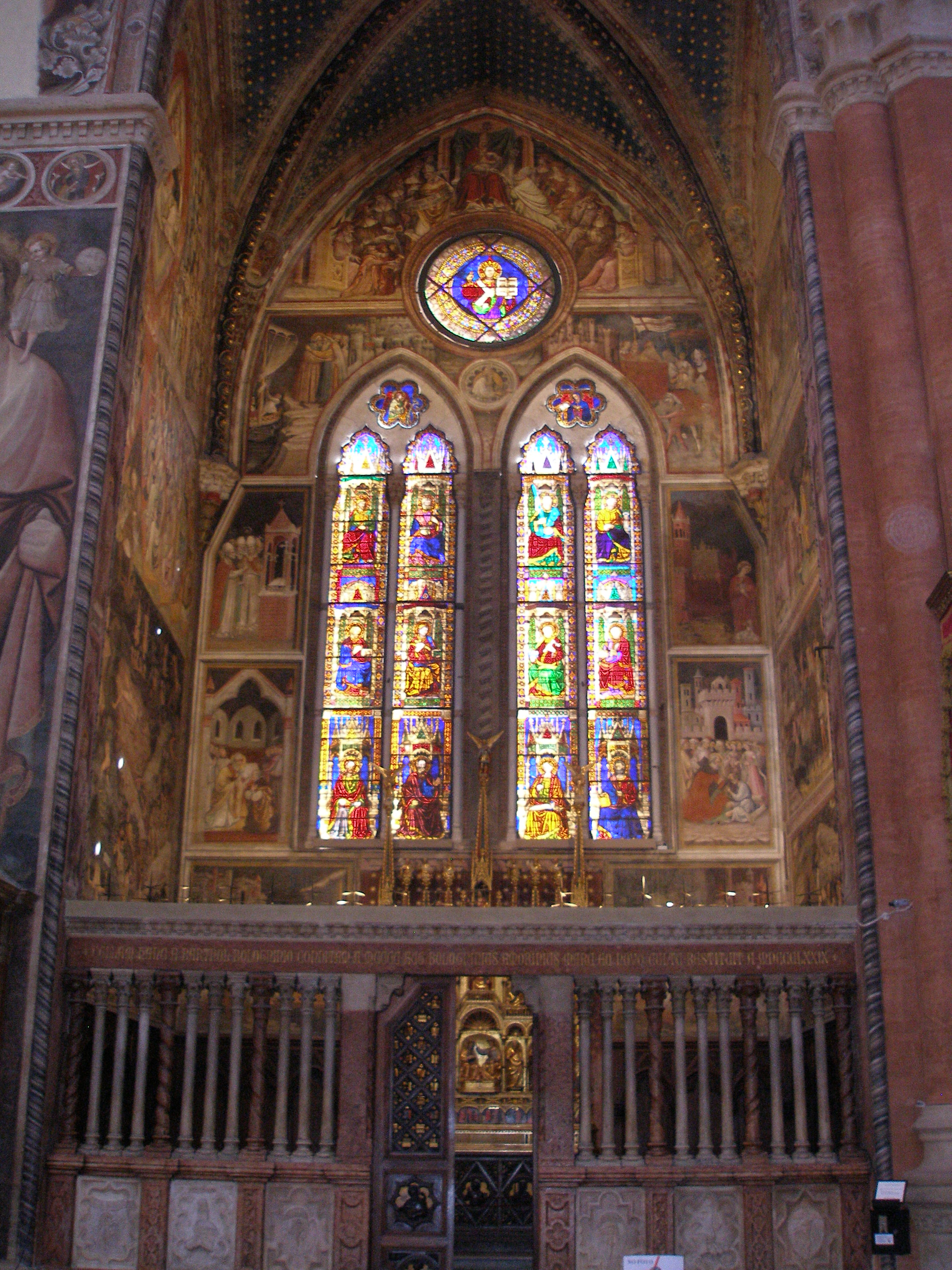 Bologna